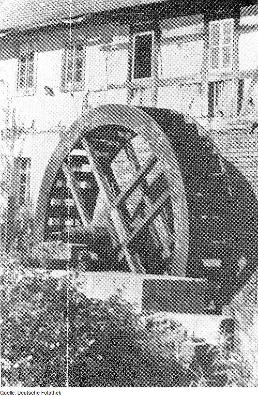 Original image description from the Deutsche Fotothek Oßling-Skaska. Mühle, Wasserrad, aus: Kamenzer Kulturspiegel, 1958